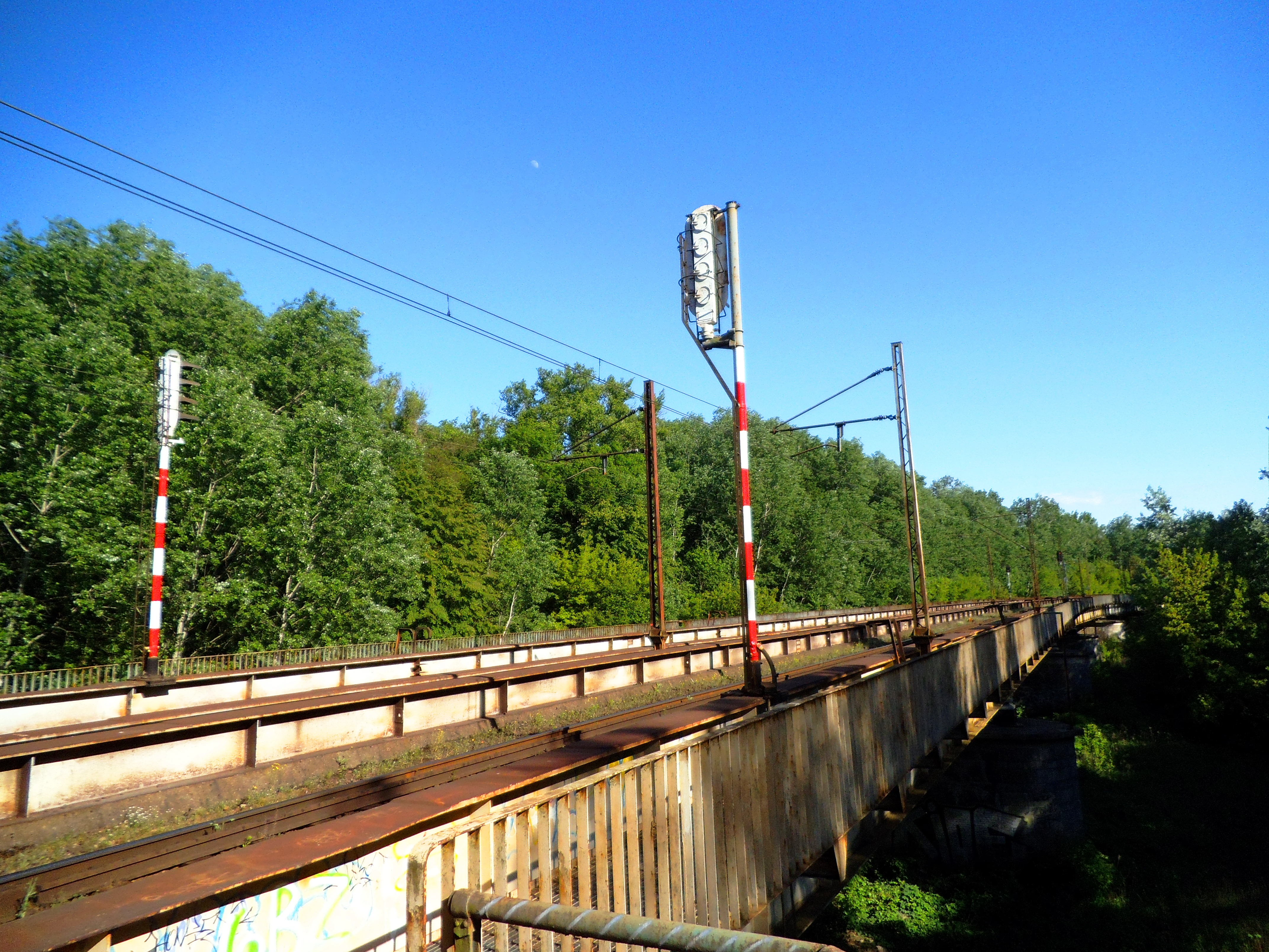 Estakada kolejowa w Toruniu